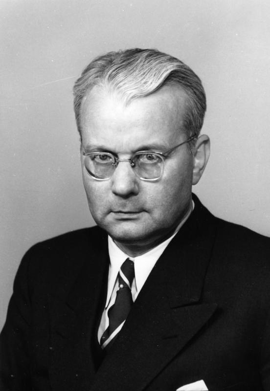 Franz Blücher Bundesminister für Angelegenheiten des Marshallplanes, 1949-1953